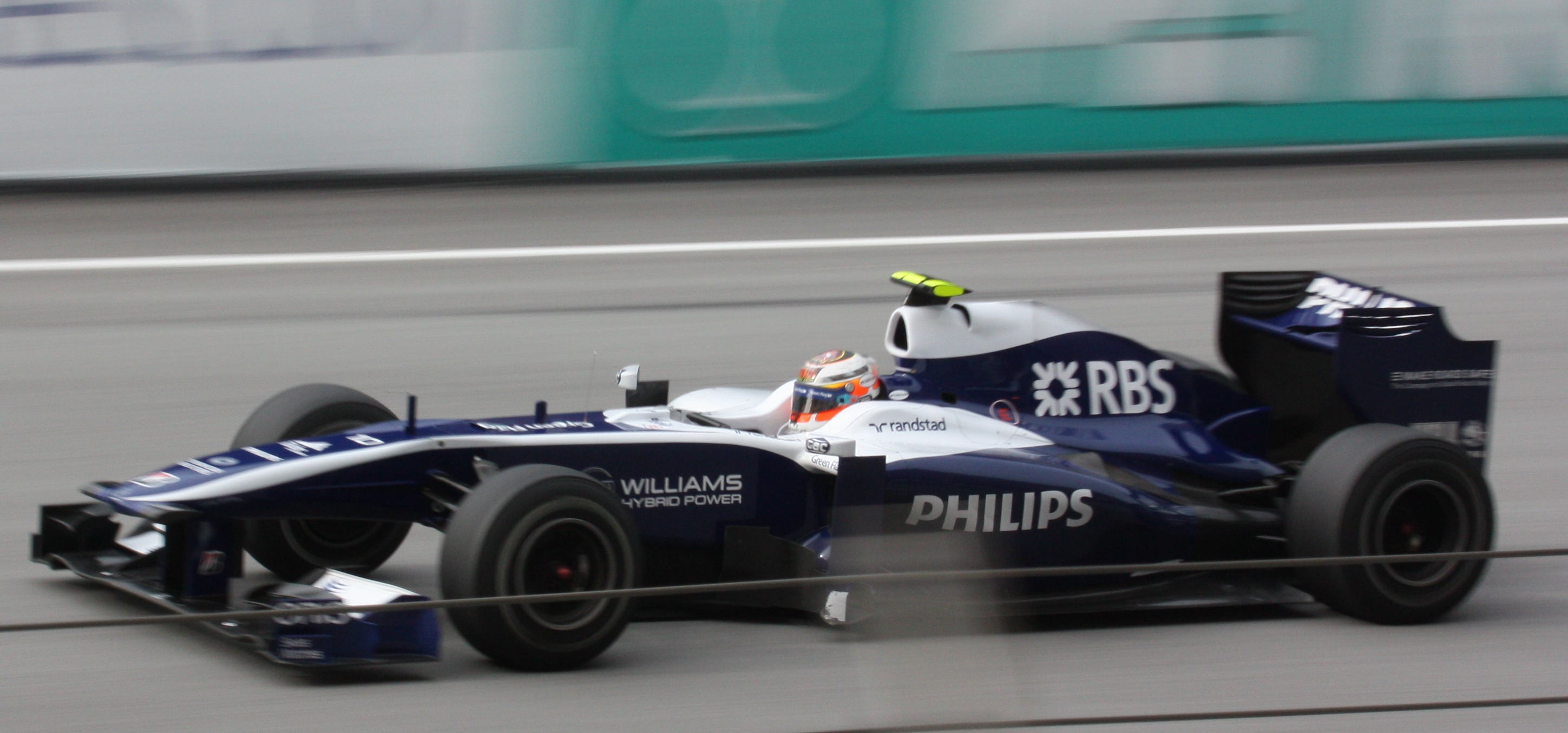 Hulkenberg Malaysia